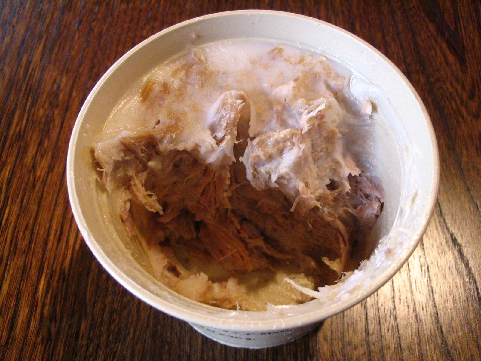 Pot de Rillette du Mans, France